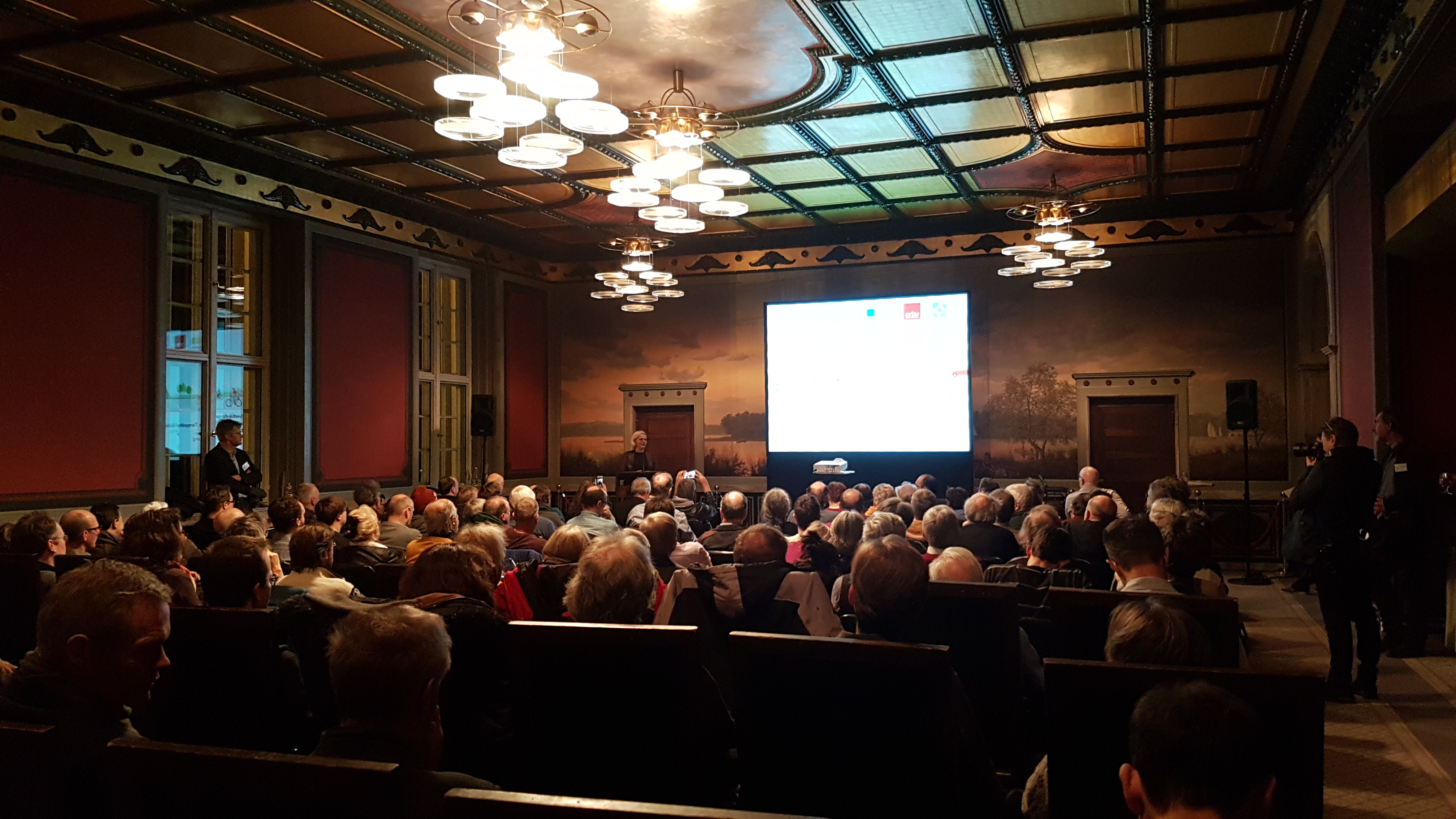 Informations- und Dialogveranstaltung zur Radschnellverbindung Teltowkanal im Rathaus Schöneberg mit Regine Günter, Senatorin für Umwelt, Verkehr und Klimaschutz Thomas Richter, Leiter des Fachgebiets Straßenplanung und Straßenbetrieb an der Technischen Universität Berlin Christiane Heiß, Bezirksstadträtin